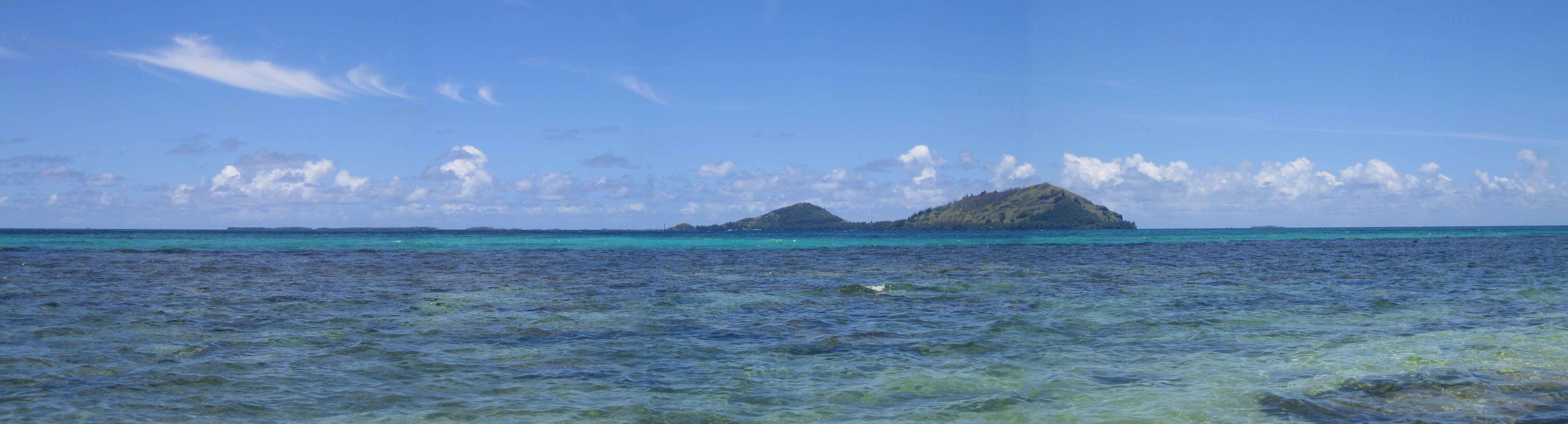 Aukena, Gambier Islands, French Polynesia